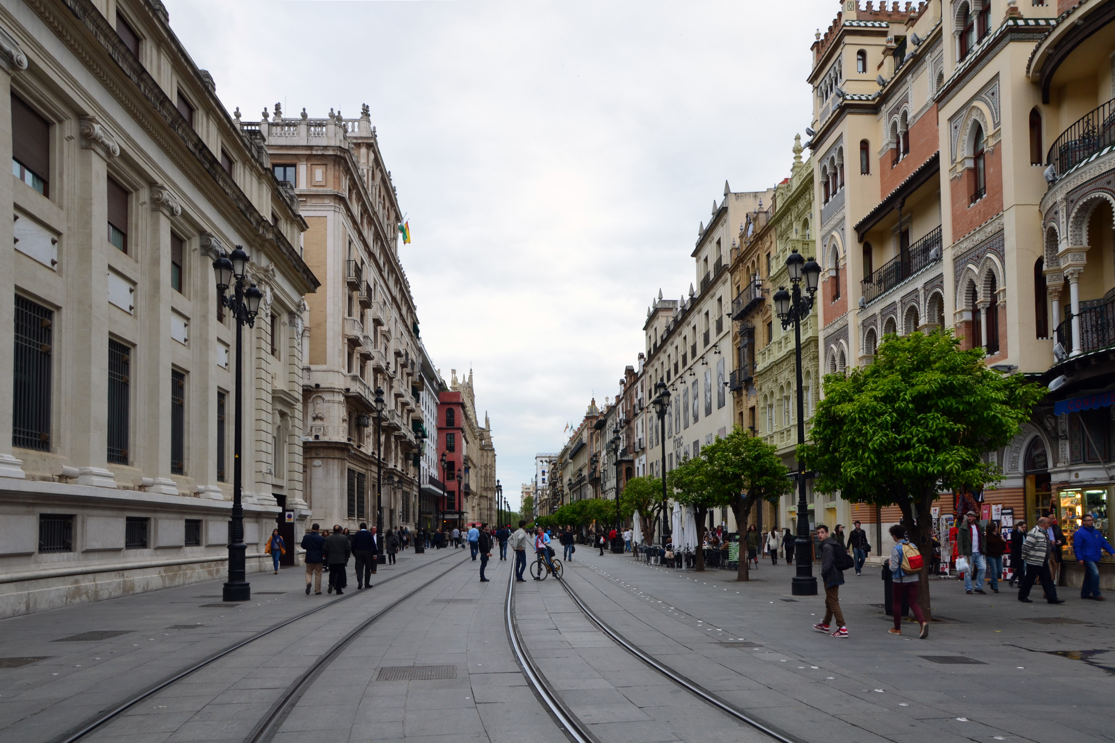 L'avenue de la Constitution (Séville, Espagne) vue de l'extrémité sud de la place de San Francisco